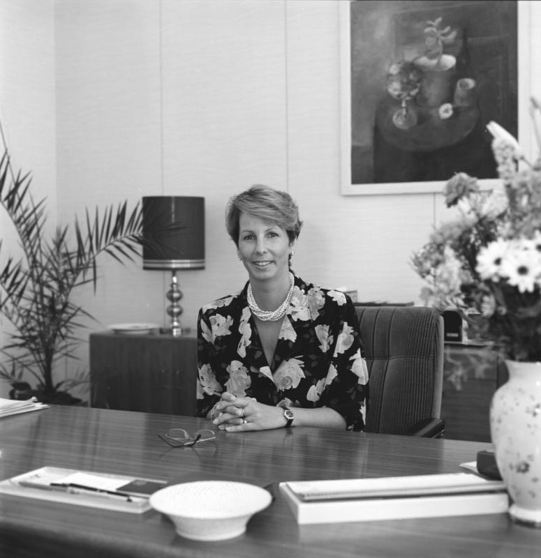 ADN/Elke Schöps/13.8.90/Berlin: Dr. Sabine Bergmann-Pohl, Präsidentin der Volkskammer der Deutschen Demokratischen Republik und amtierendes Staatsoberhaupt.